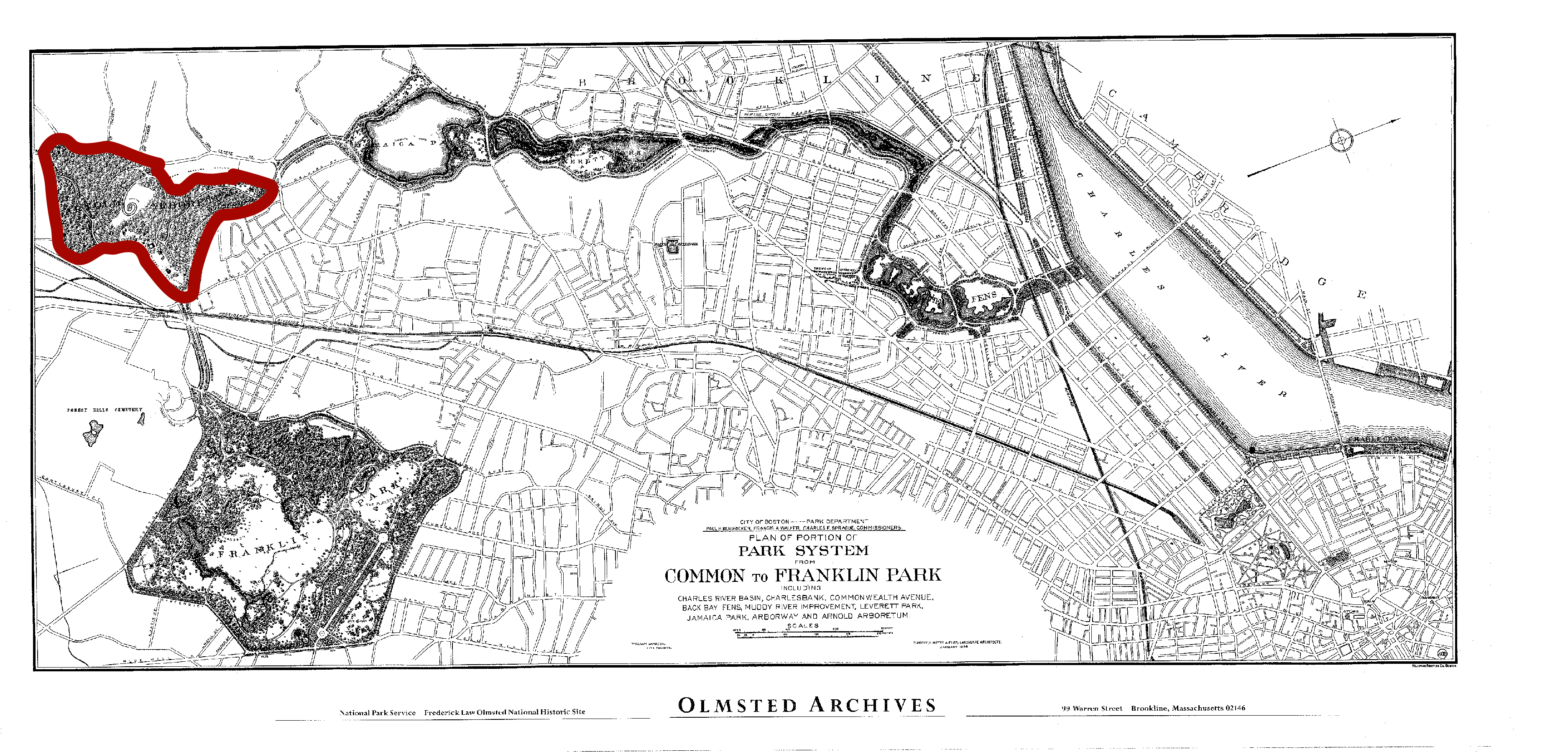 Lage des Arnold-Arboretums im Emerald Necklace, Bearbeitung der Commons-Datei File:Olmsted historic map Boston.png